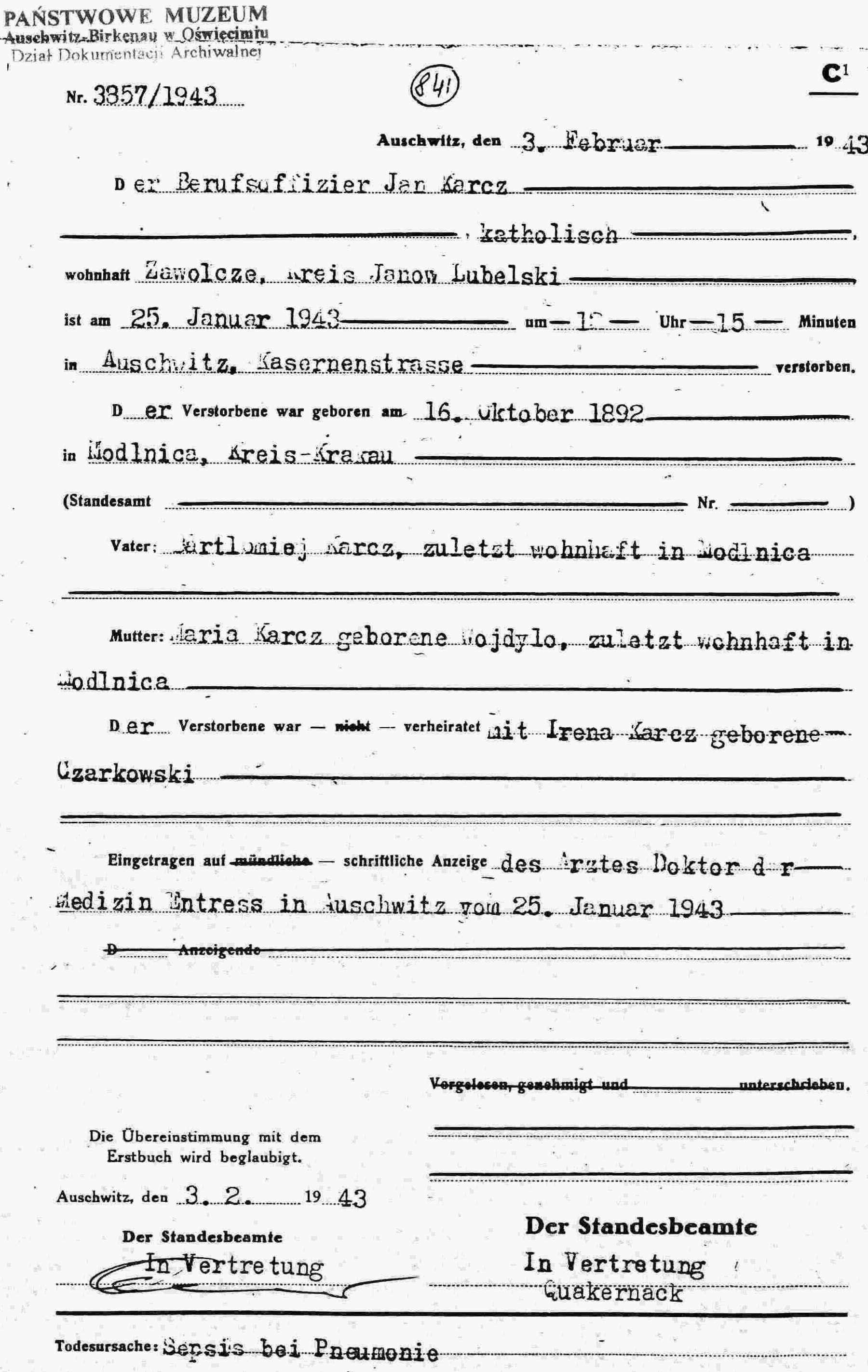 Kopia świadectwa zgonu będącego w zasobach Archiwum Państwowego Muzeum Auschwitz - Birkenau w Oświęcimiu